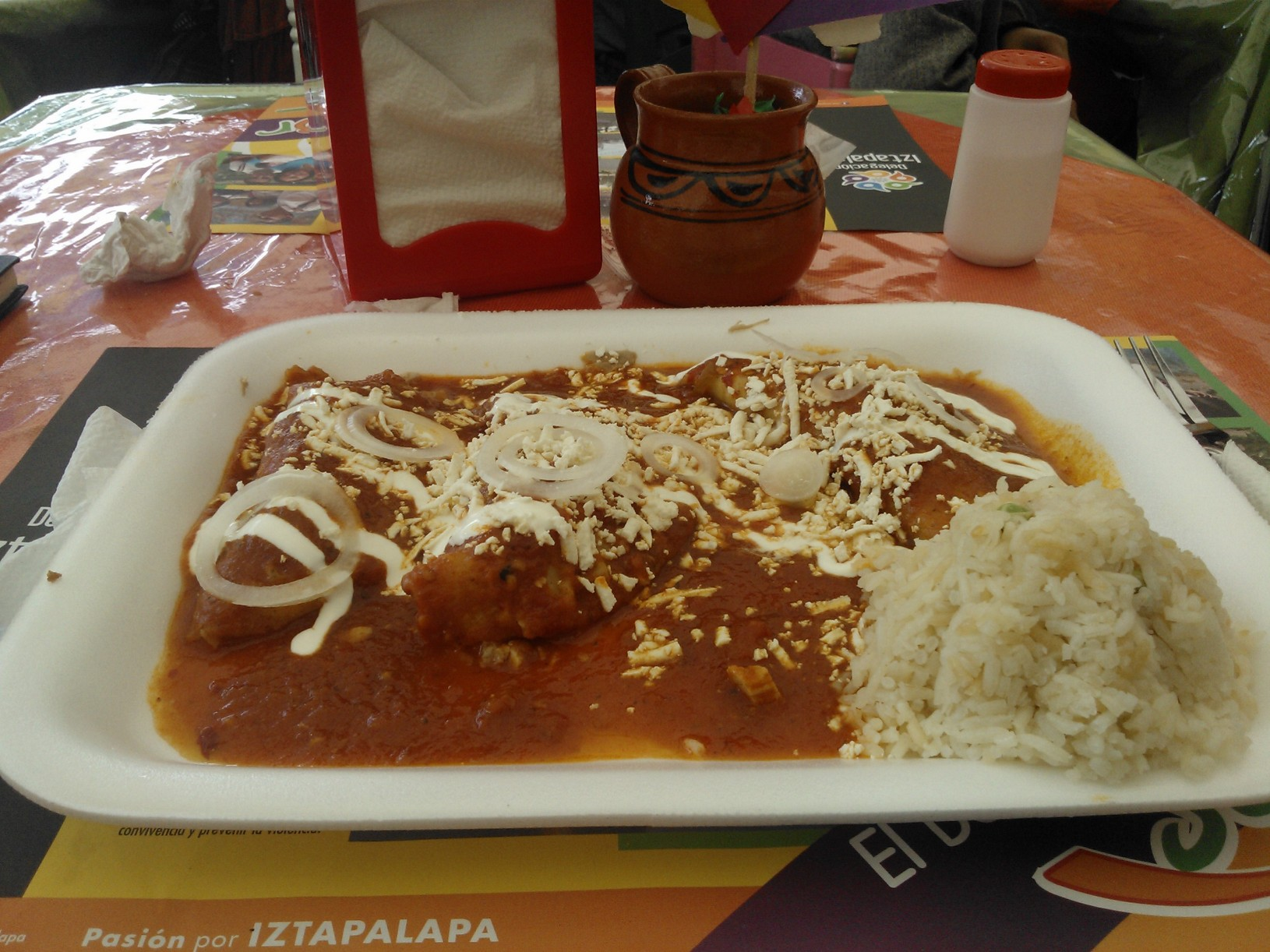 Fotografía de enchiladas rellenas de carnitas de cerdo con salsa roja tipo torta ahogada dentro del Festival turístico y gastronómico de la Enchilada, que se llevó a cabo en el Jardín Cuitláhuac, en la delegación Iztapalapa.